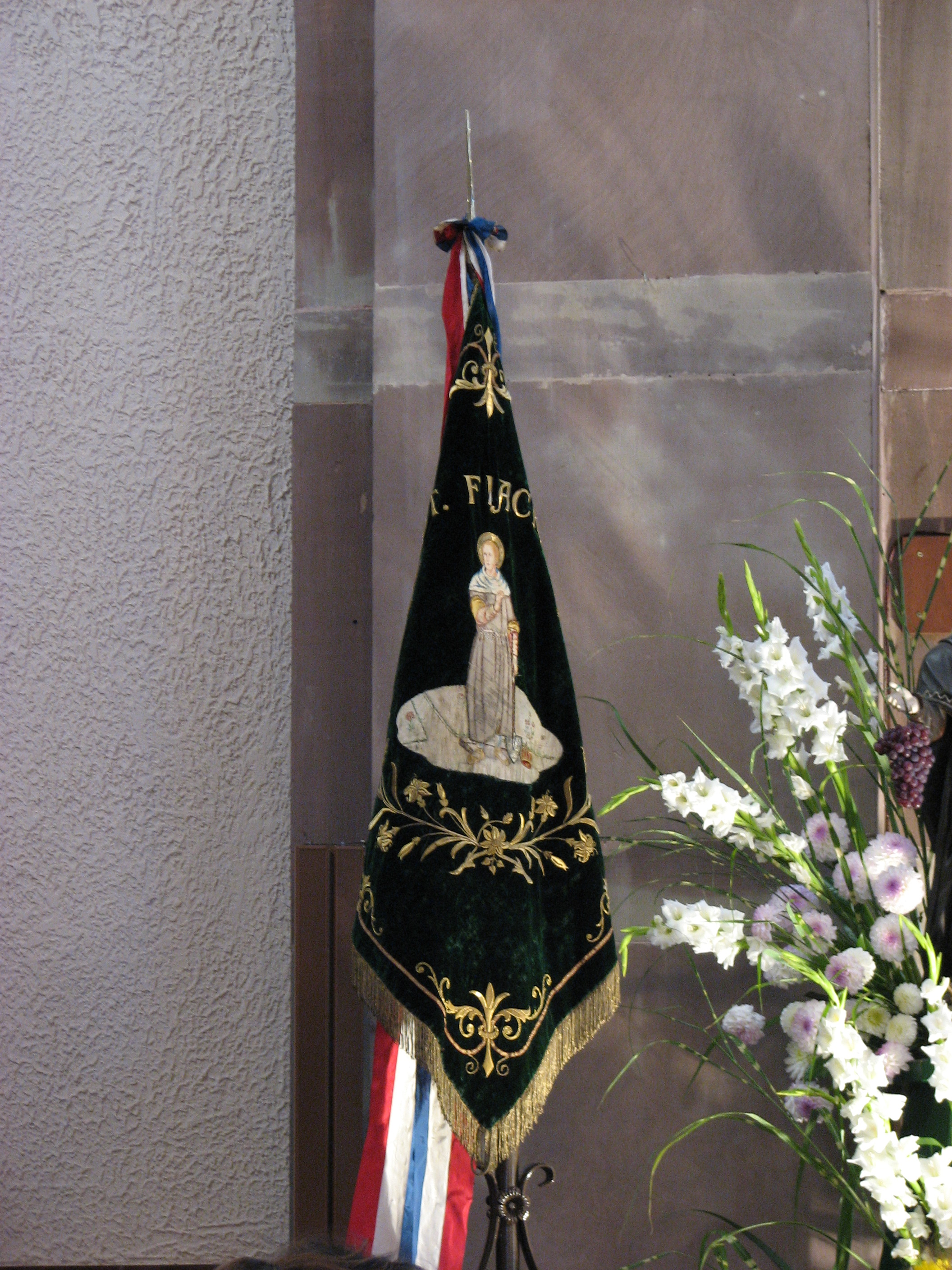 Drapeau de la confrérie Saint-Fiacre de la Robertsau (Strasbourg) pendant la fête des maraîchers en 2009.